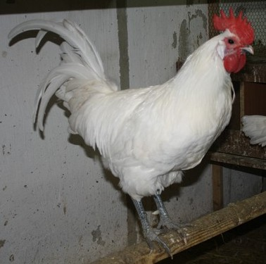 Ramelsloher Hahn weiß